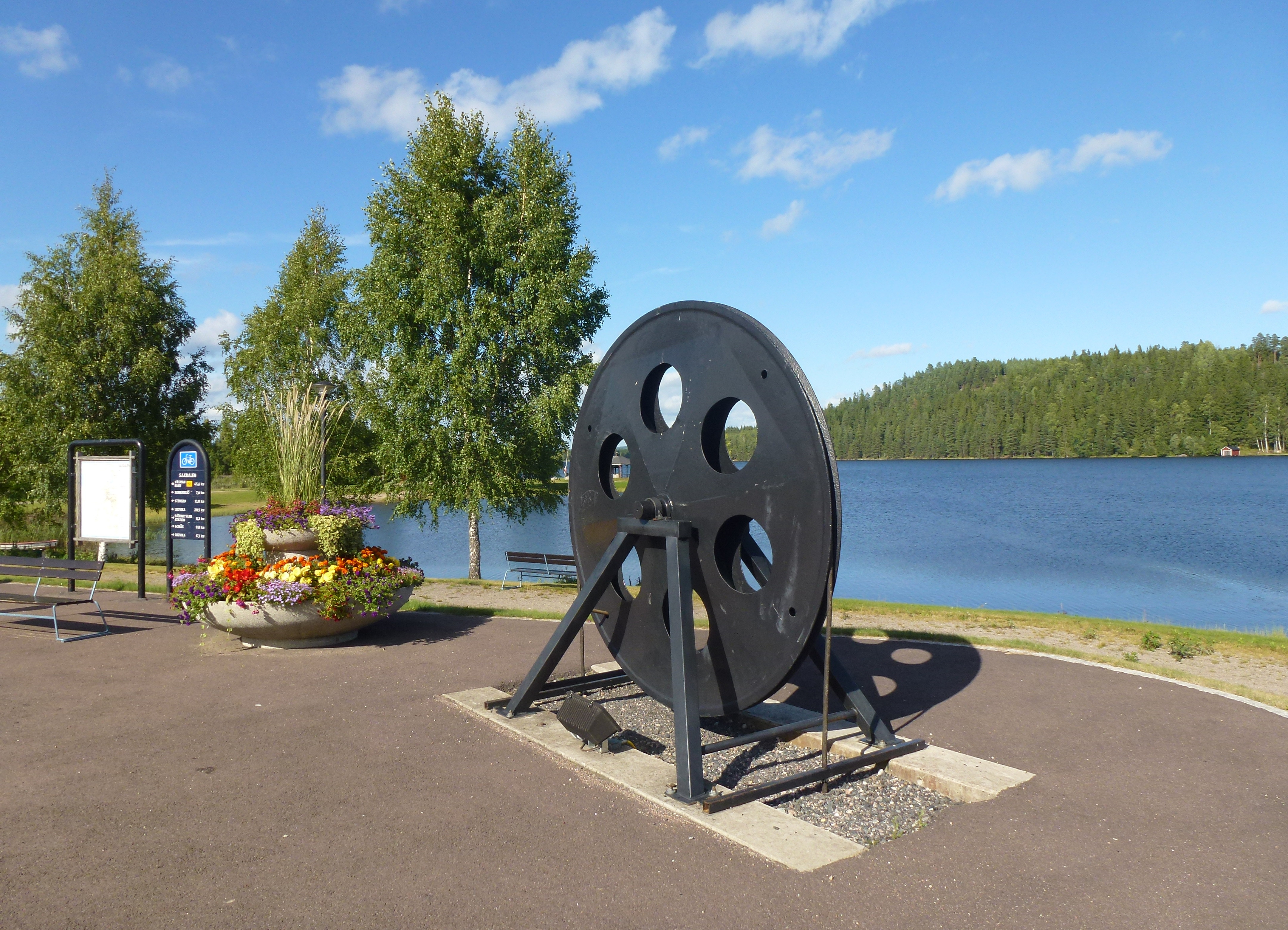 Saxdalen